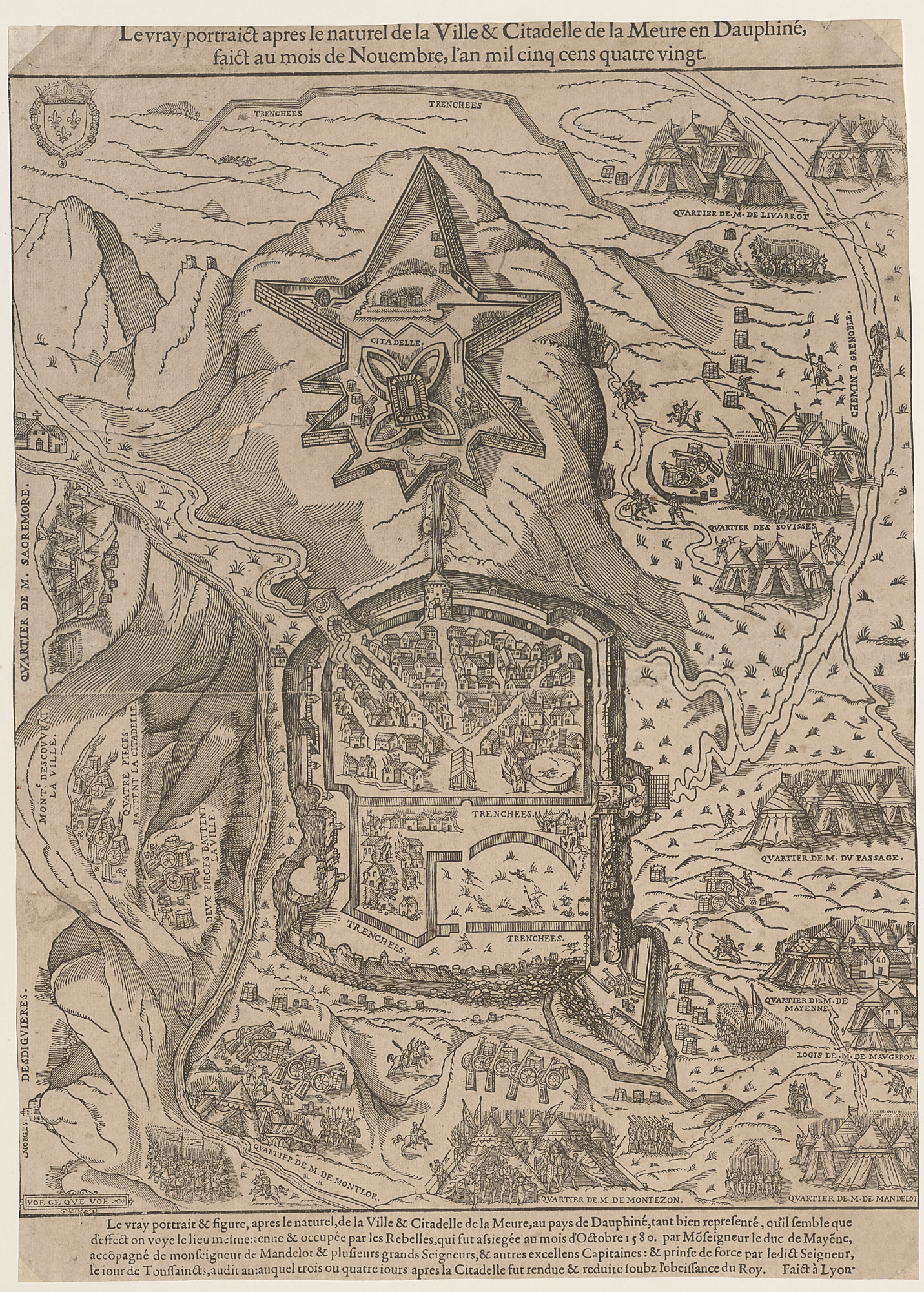 Le vray Portraict après le naturel de la ville et citadelle de La Meure en Dauphíne; Holzschnitt, 1580